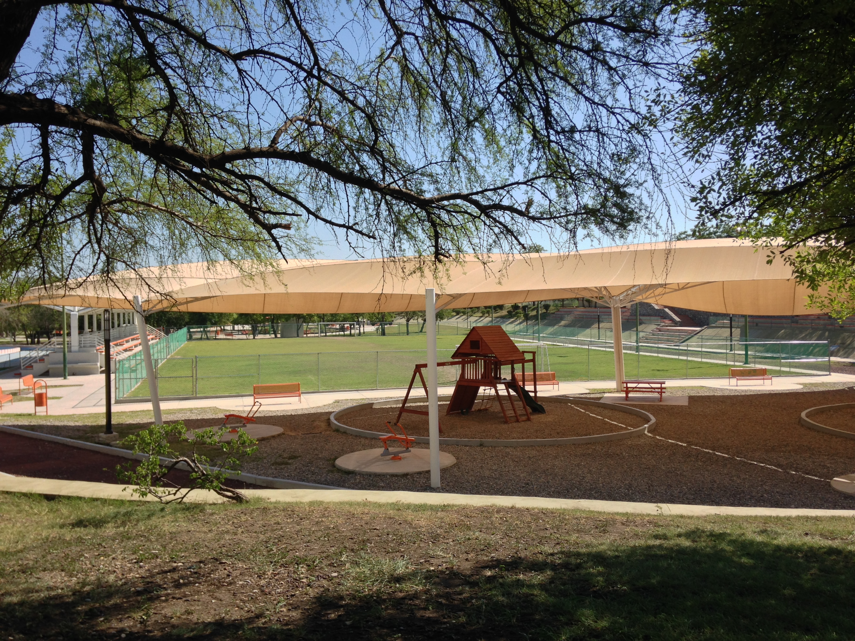 Area recreativa de la Unidad Deportiva Siglo XXI, Ciudad Victoria, estado de Tamaulipas Recreative zone inside Sporting Unit Siglo XXI in Victoria City, state of Tamaulipas, Mexico